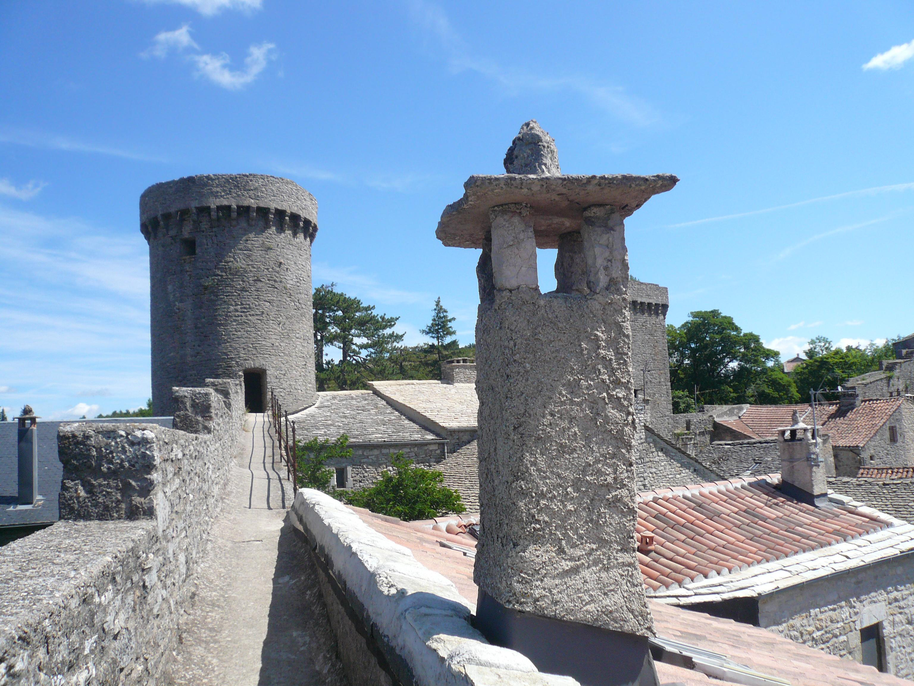 Toits de la Couvertoirade (Aveyron)